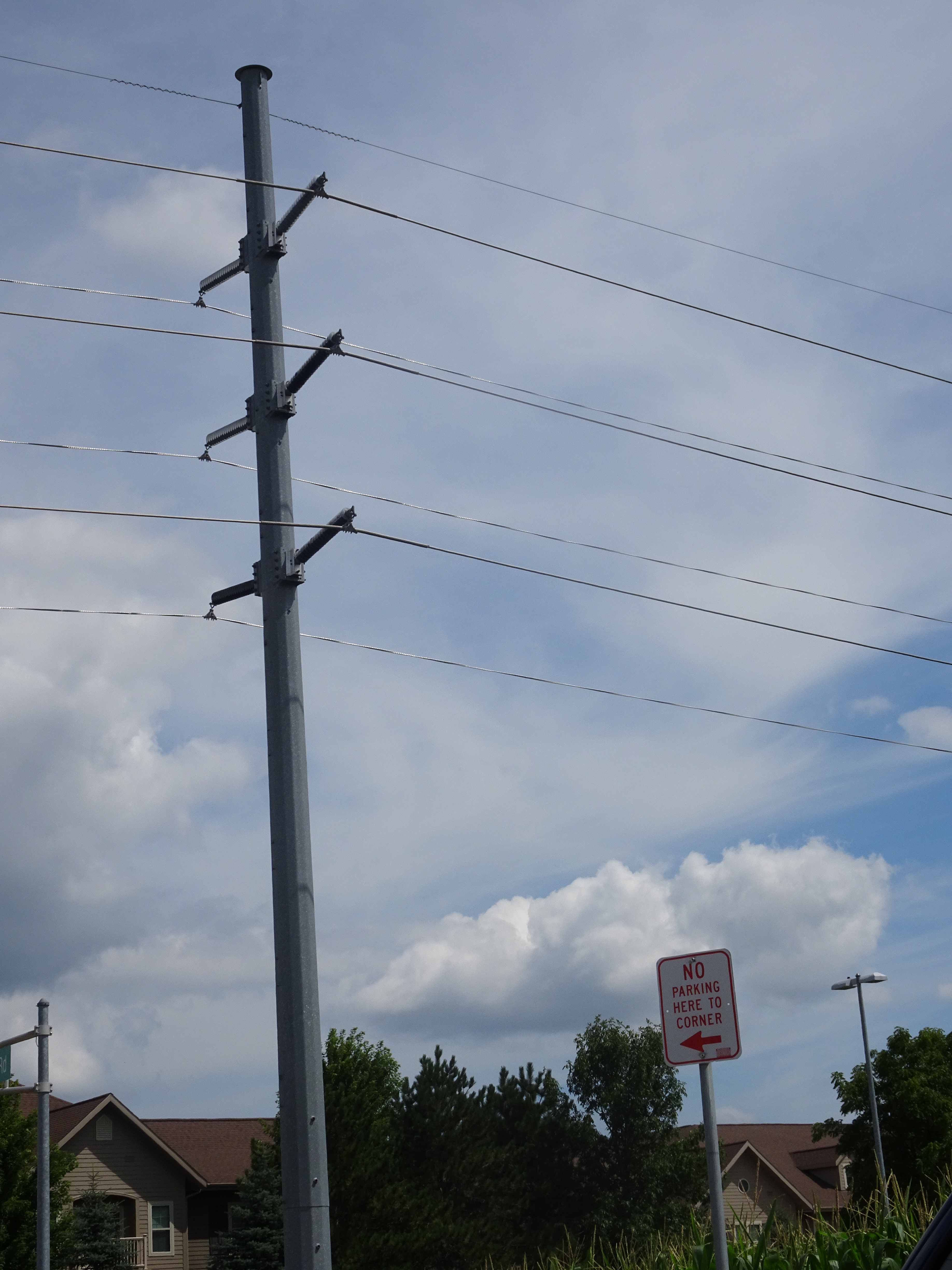 ATC Power Line